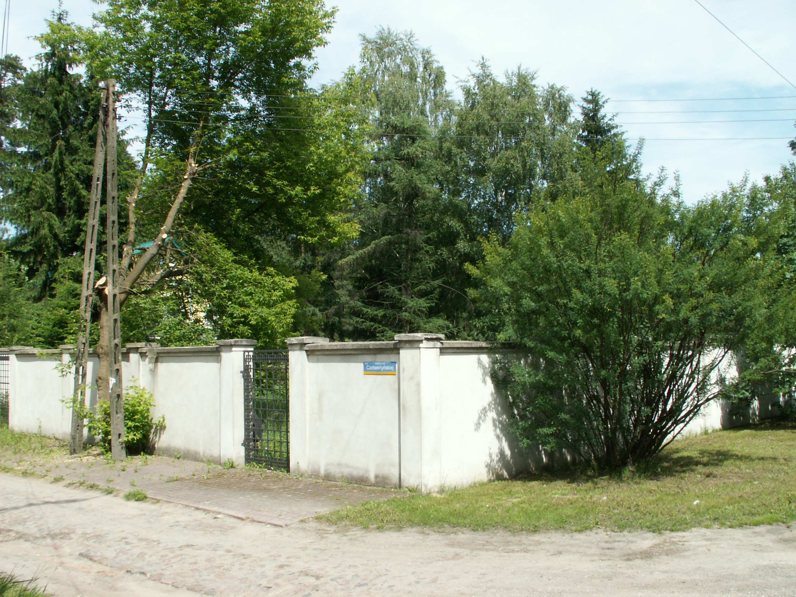 Działka w podwarszawskiej Magdalence, na której do 1999 r. znajdował się dom Violetty Villas.